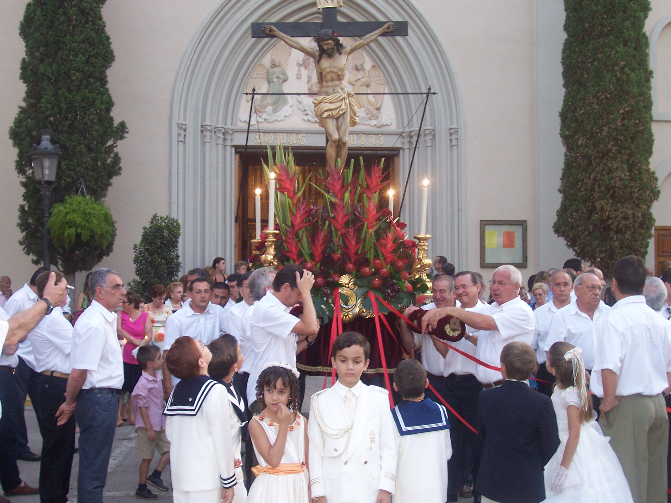 Cristo del Consuelo, Patron, La eliana